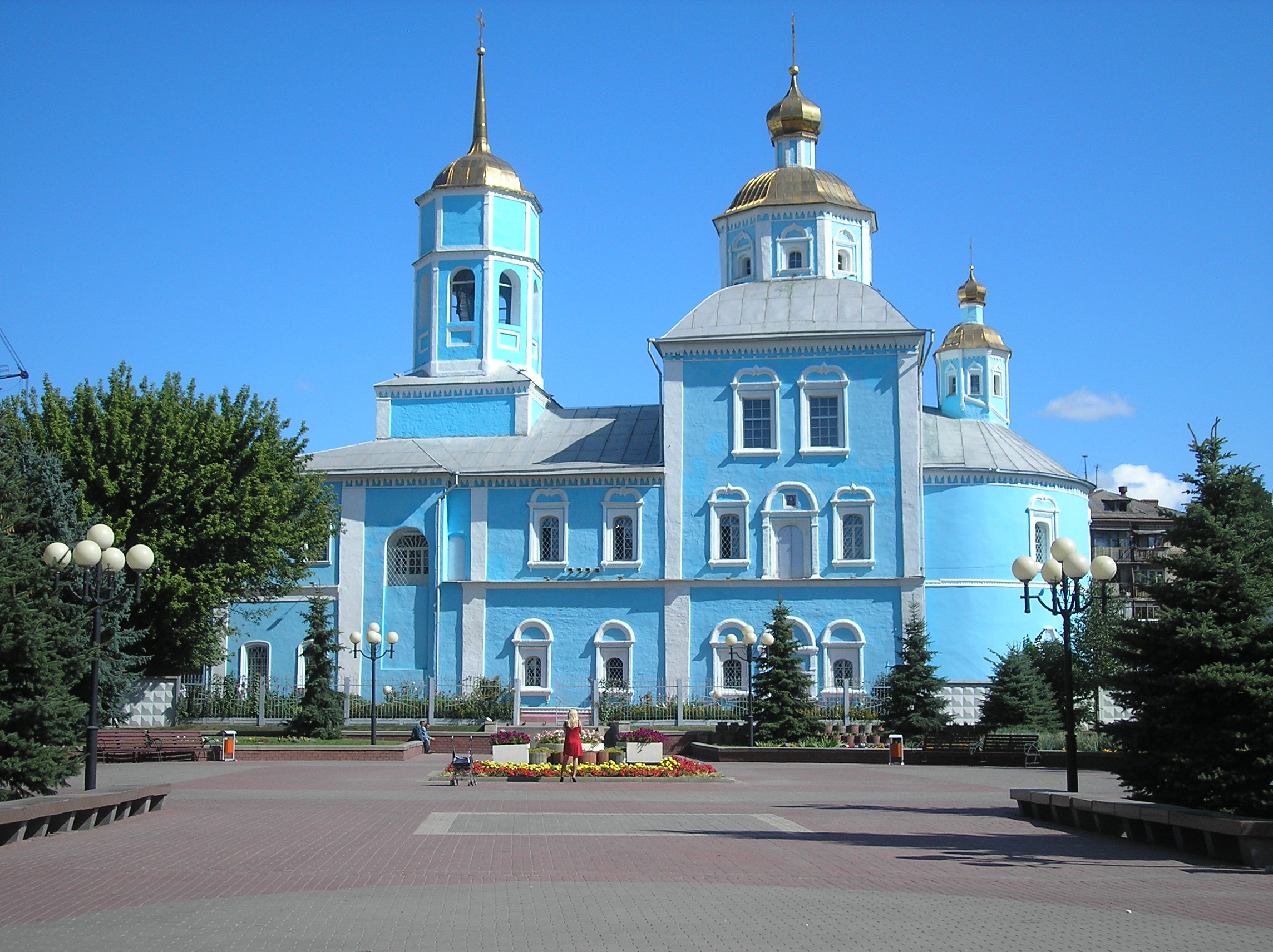 Белгород. Смоленский собор